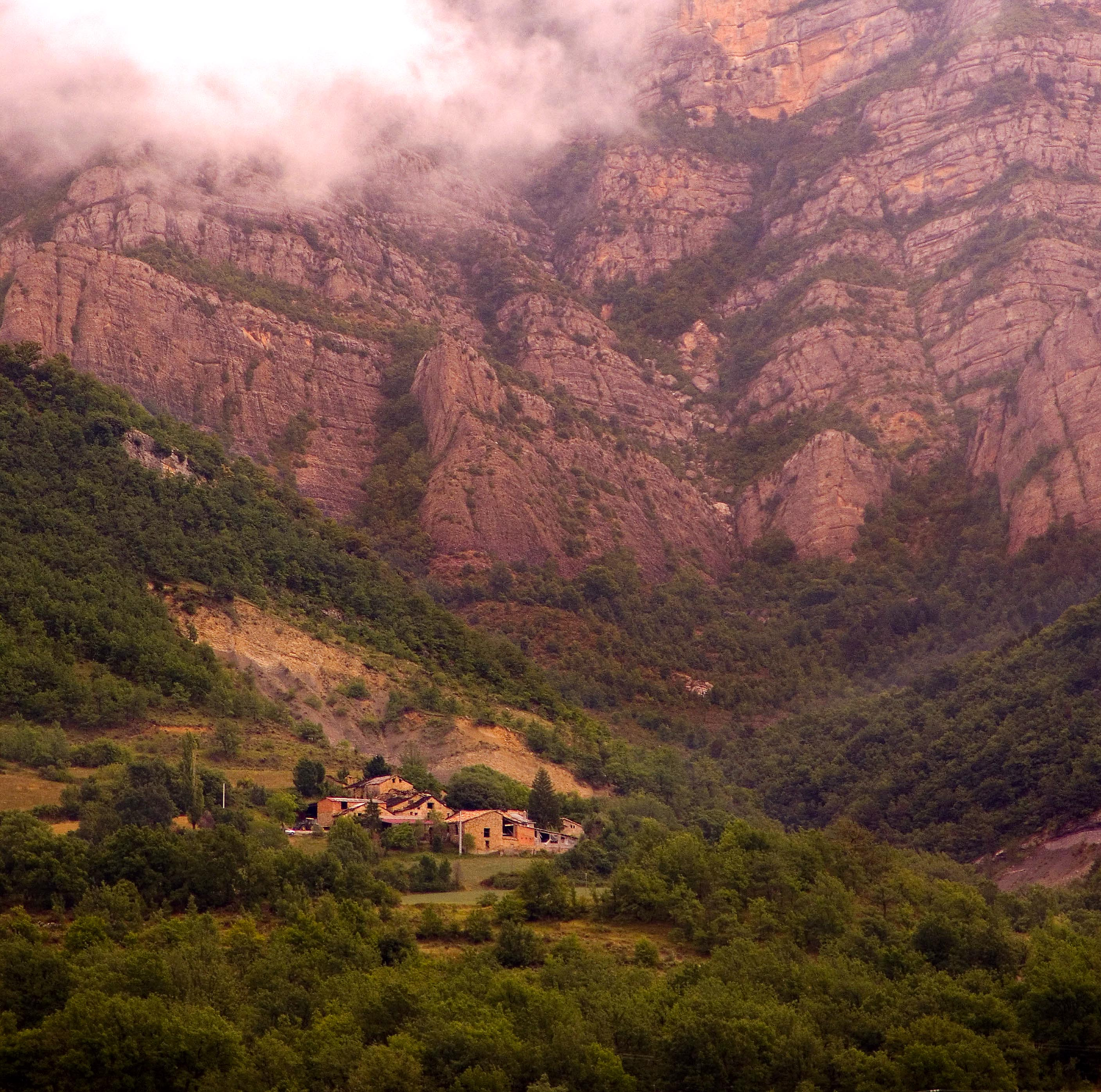 Poble situat a 900 metres d'altitud, en el municipi de Beranui. Biasques tenia 24 habitants. A la banda inferior de la carretera es troben les fonts de Sant Cristòfol.